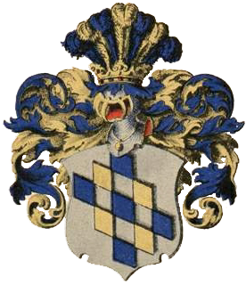 Buddenbrocki suguvõsa aadlivapp